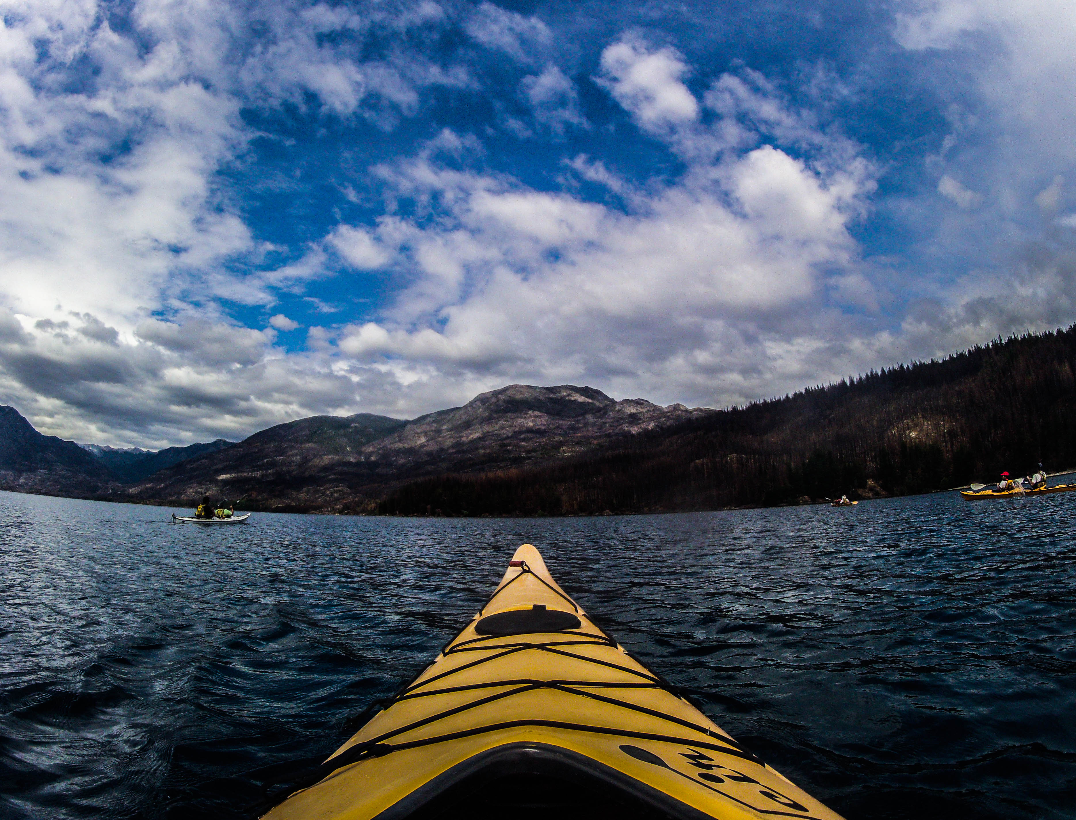 Kayak en Lago Epuyen - Chubut.jpg